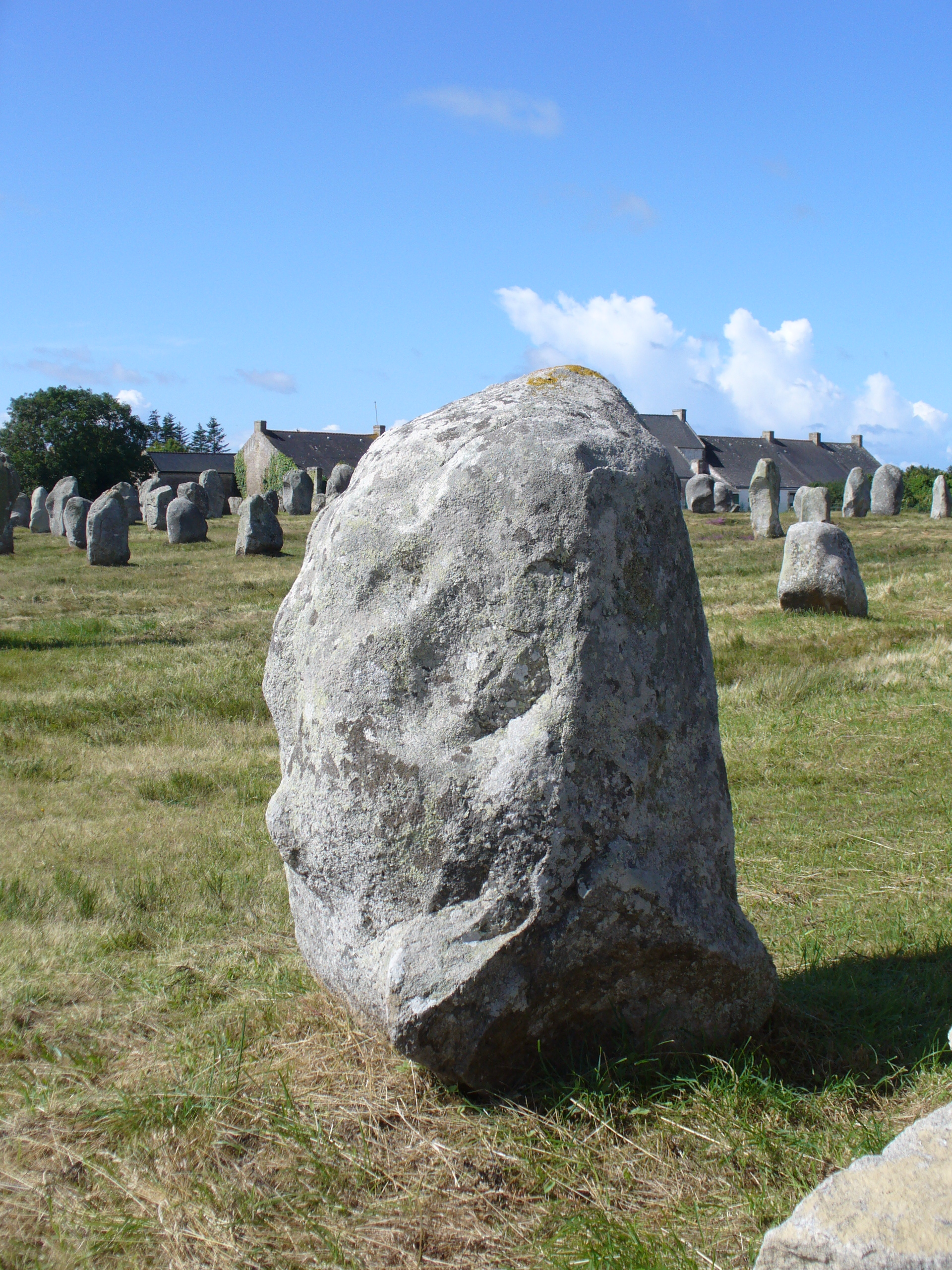 1099 Menhire,bis zu 4 Meter hoch,von Ost nach West in 1167 Meter Langen Alignements(Steinreihen) in einem Halbkreis(Cromlechs) endend. (Jungsteinzeit, Neolithikum ,Neolithic ,Néolithique 4500-2300 v.Chr.) Megalithanlage von Le Ménec, Carnac ,Departement Morbihan ,Bretagne